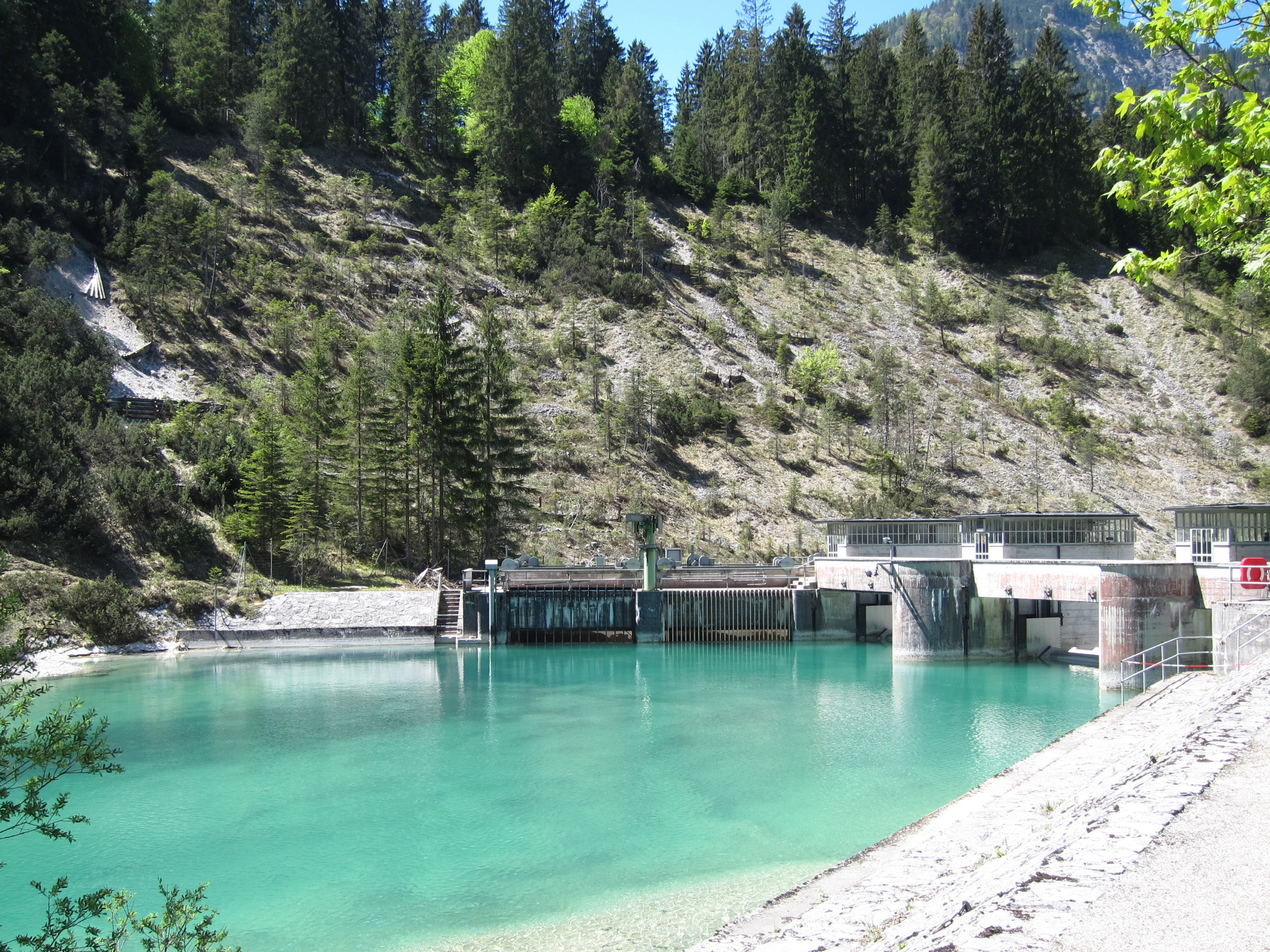 Rißbachwehr, links der Einlauf, rechts das Stauwehr